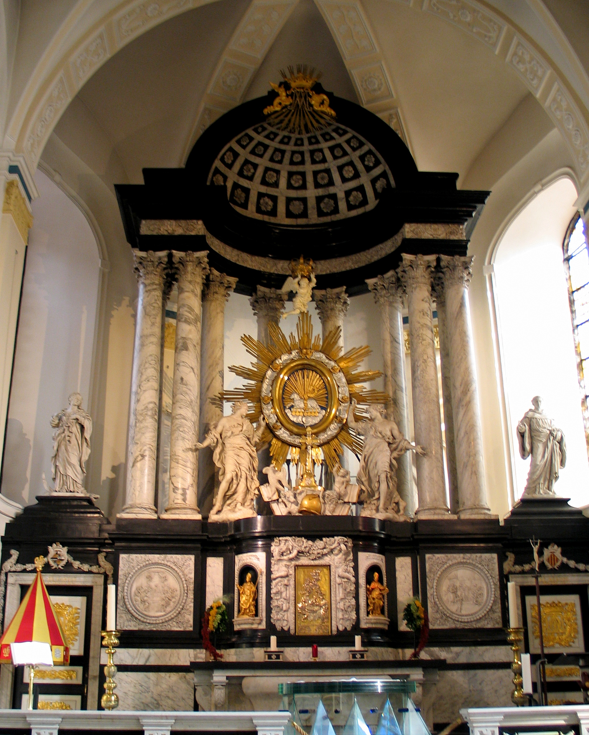 altaar vervaardigd door Jean Del Cour in de Virga-Jessebasiliek van Hasselt, België